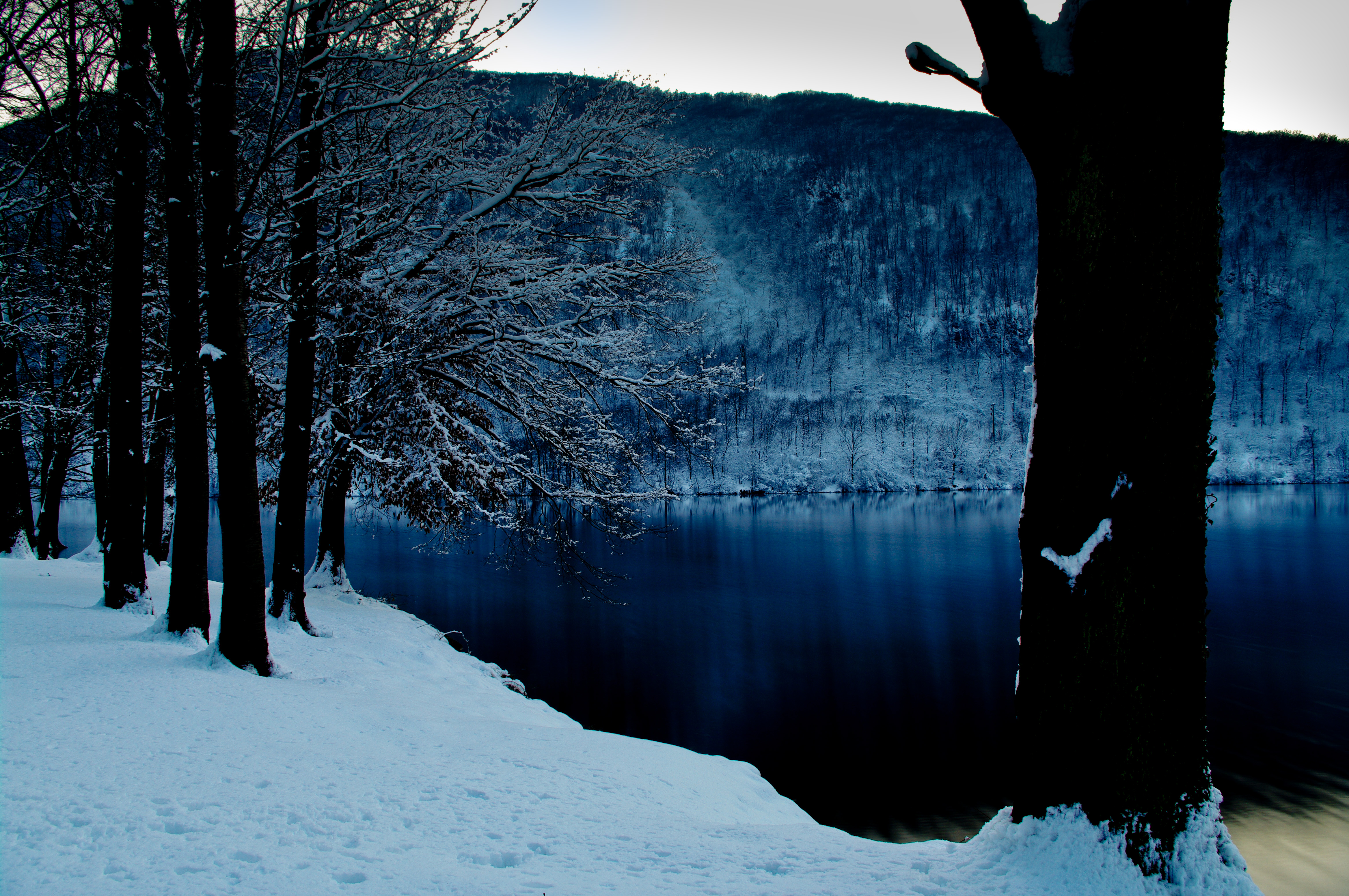 Foto del Lago di Ghirla, provincia di Varese, Italia